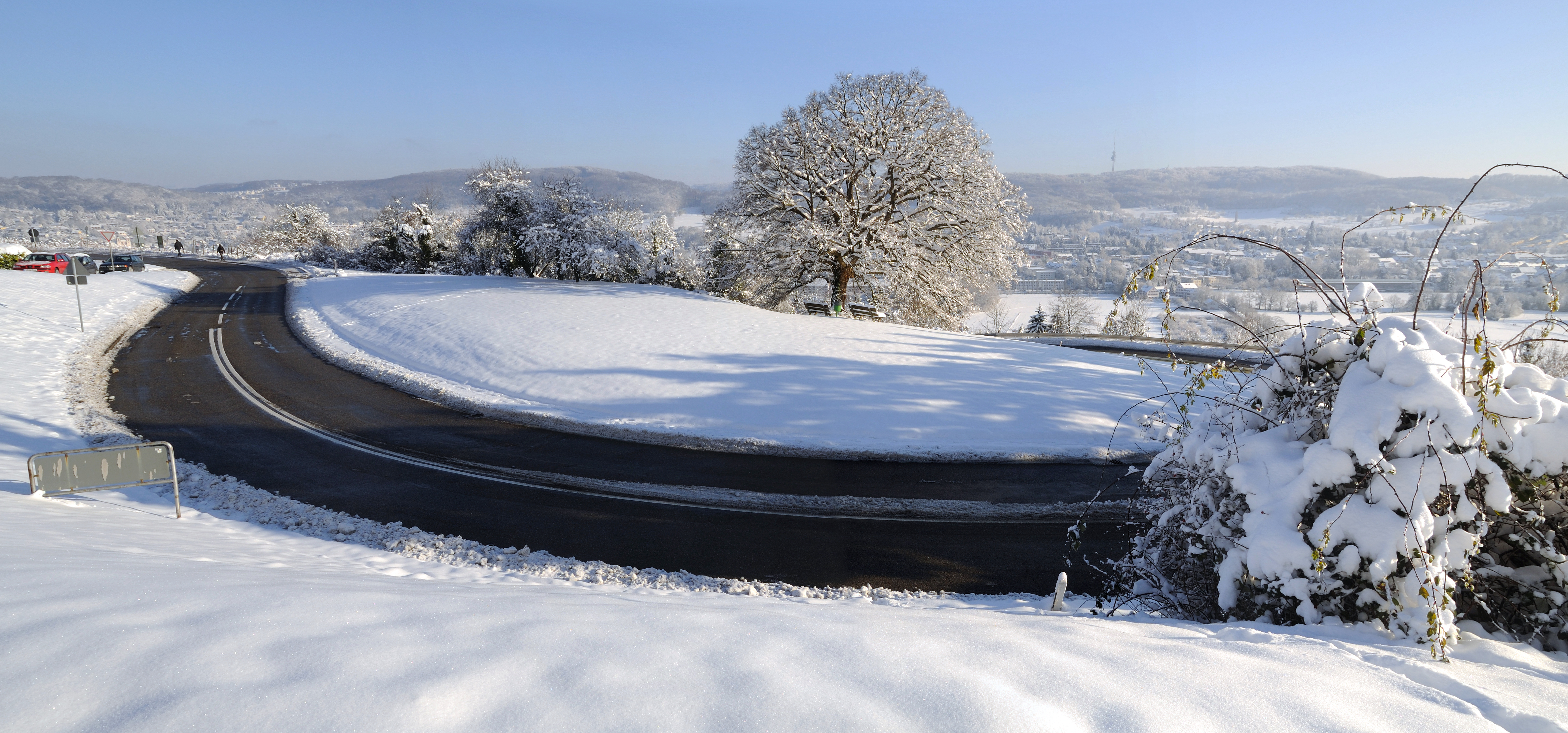 Tüllingen: Serpentine (Baselweg/ Lörracher Straße)